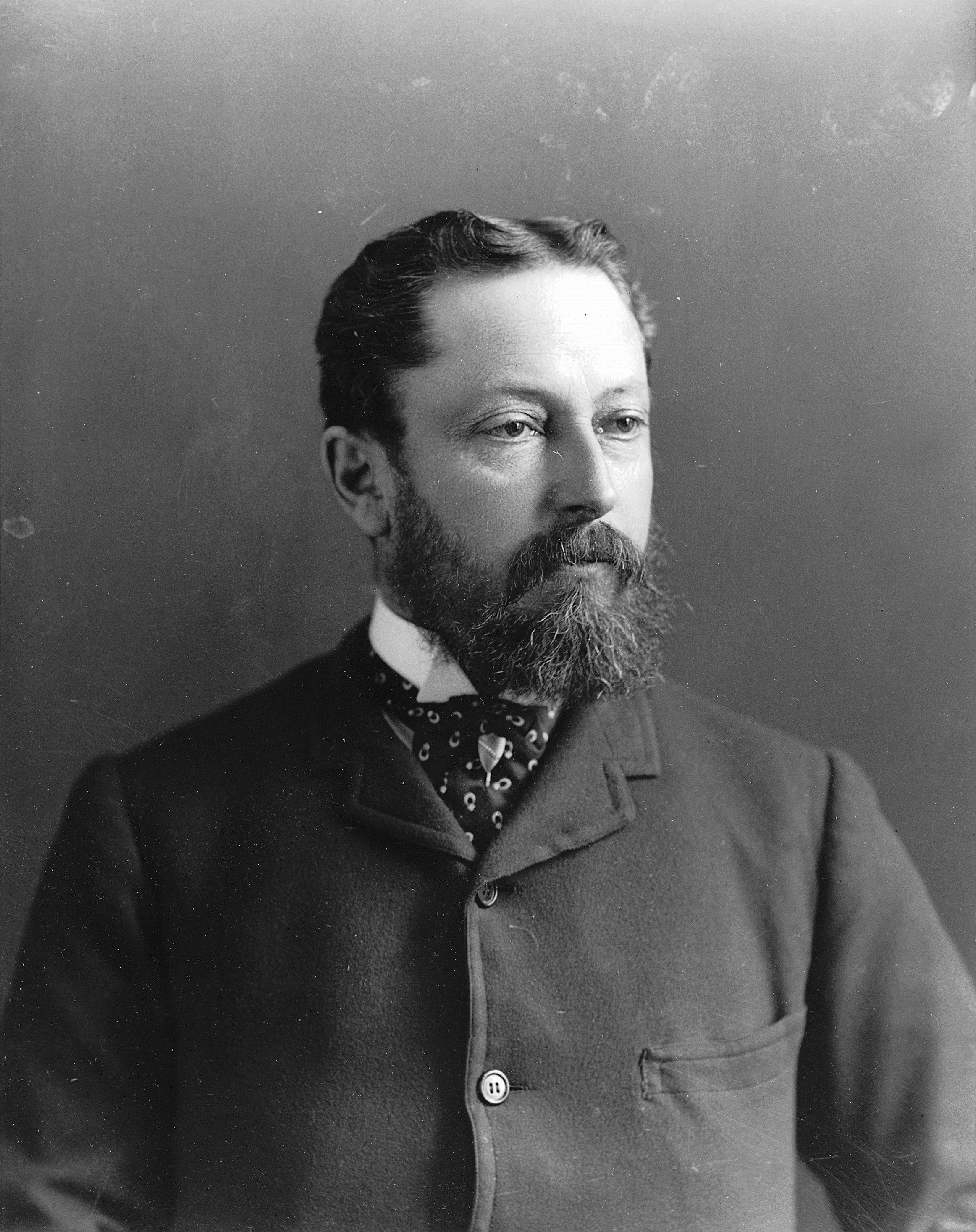 A. F. Dunlop, Montréal, QC, 1888 Wm. Notman & Son 1888, 19e siècle Plaque sèche à la gélatine 17 x 12 cm Achat de l'Associated Screen News Ltd. II-85544